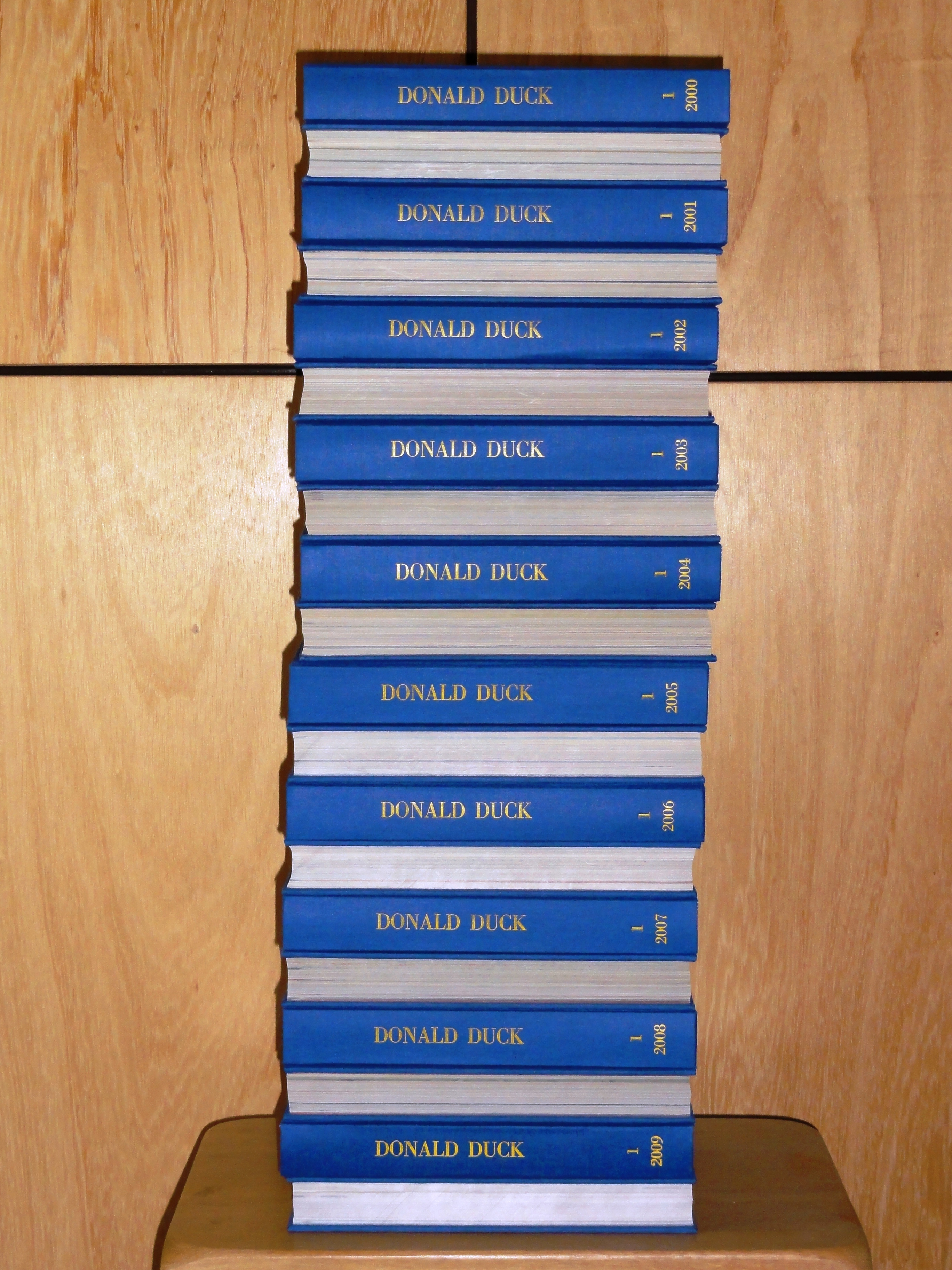 Boekbindclub Dukenburg Z29 voltooid bindwerk tijdschriften